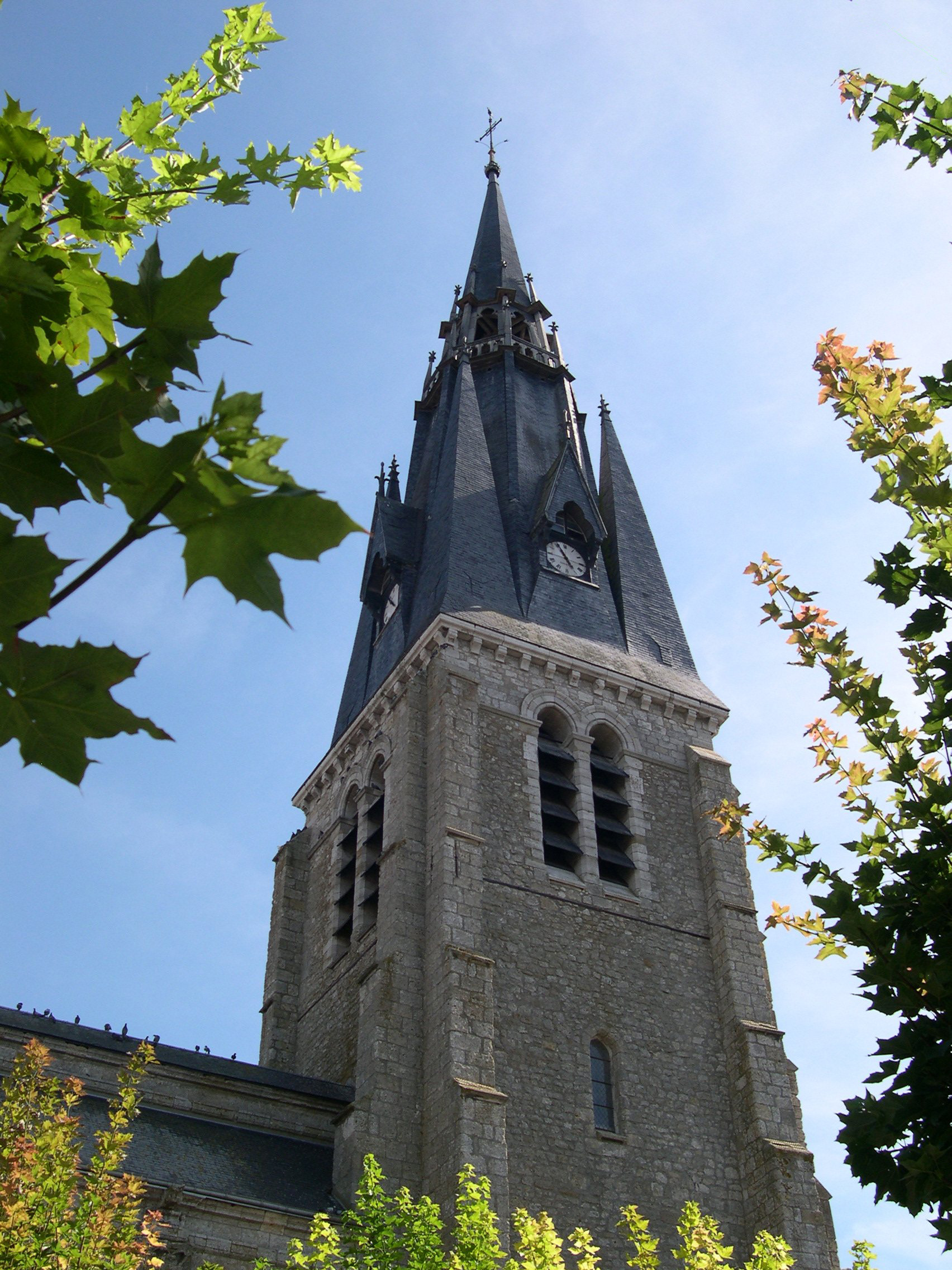 France Loiret Beaune-la-Rolande Eglise Saint-Martin Photographie prise par GIRAUD Patrick